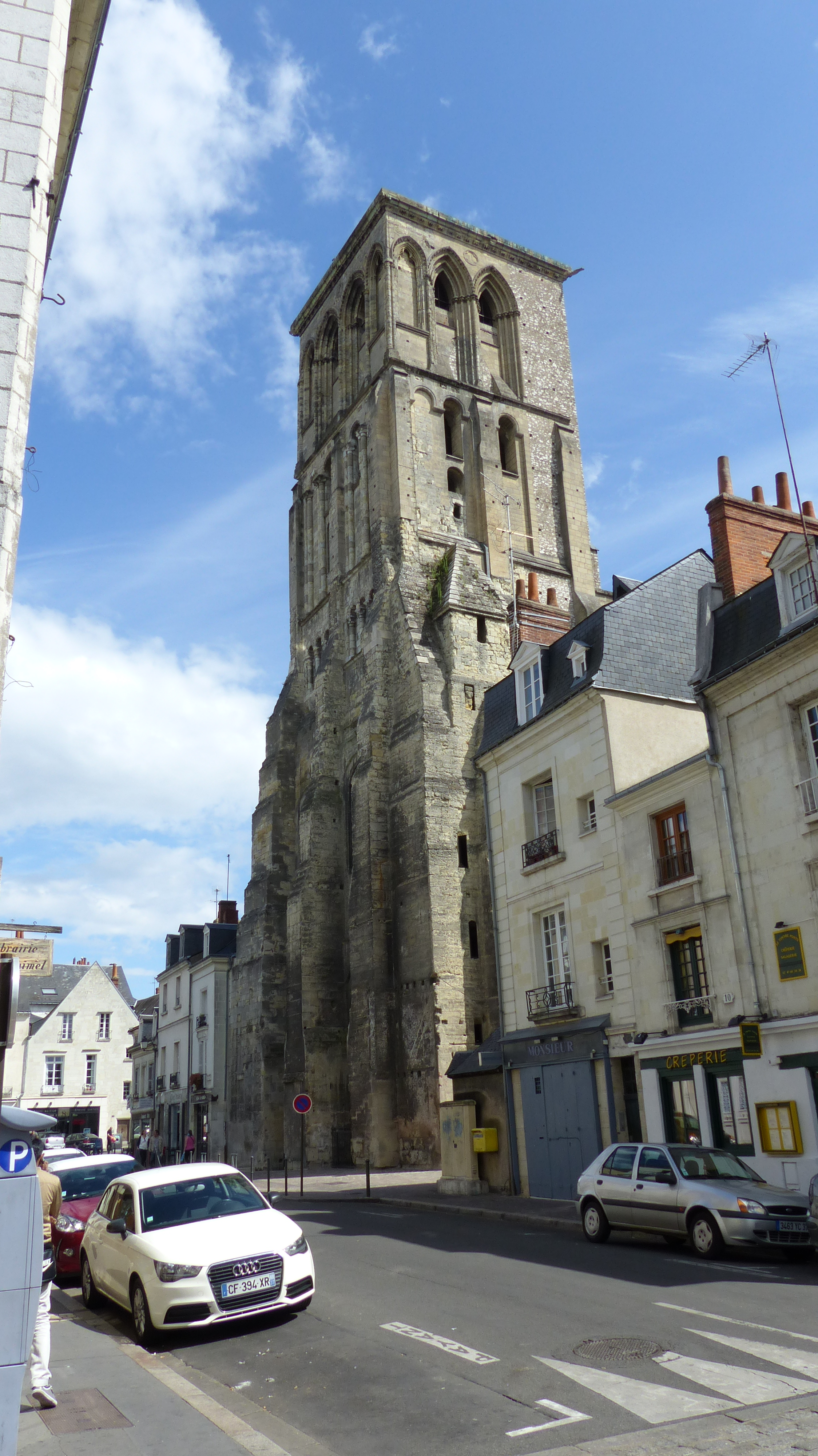 Abbaye Saint-Martin .